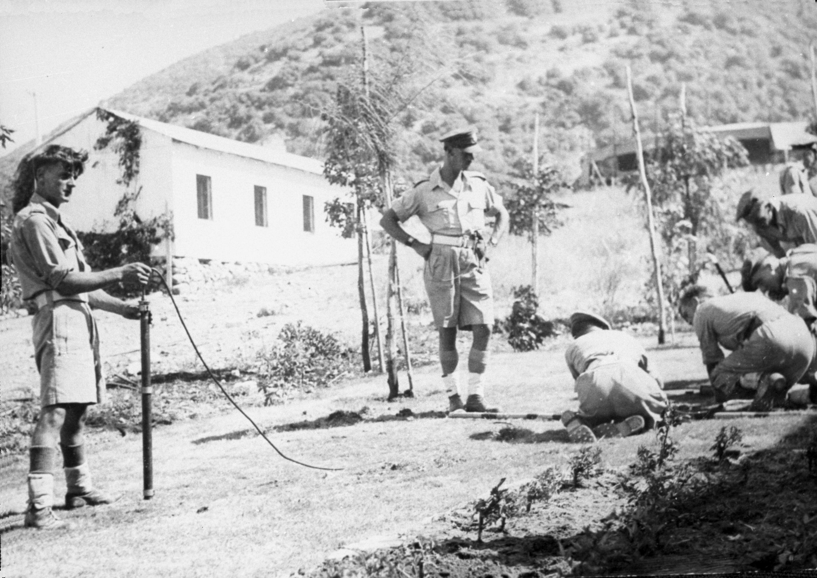 חיפושי נשק בקיבוץ יגור ע"י הבריטים בשבת השחורה.